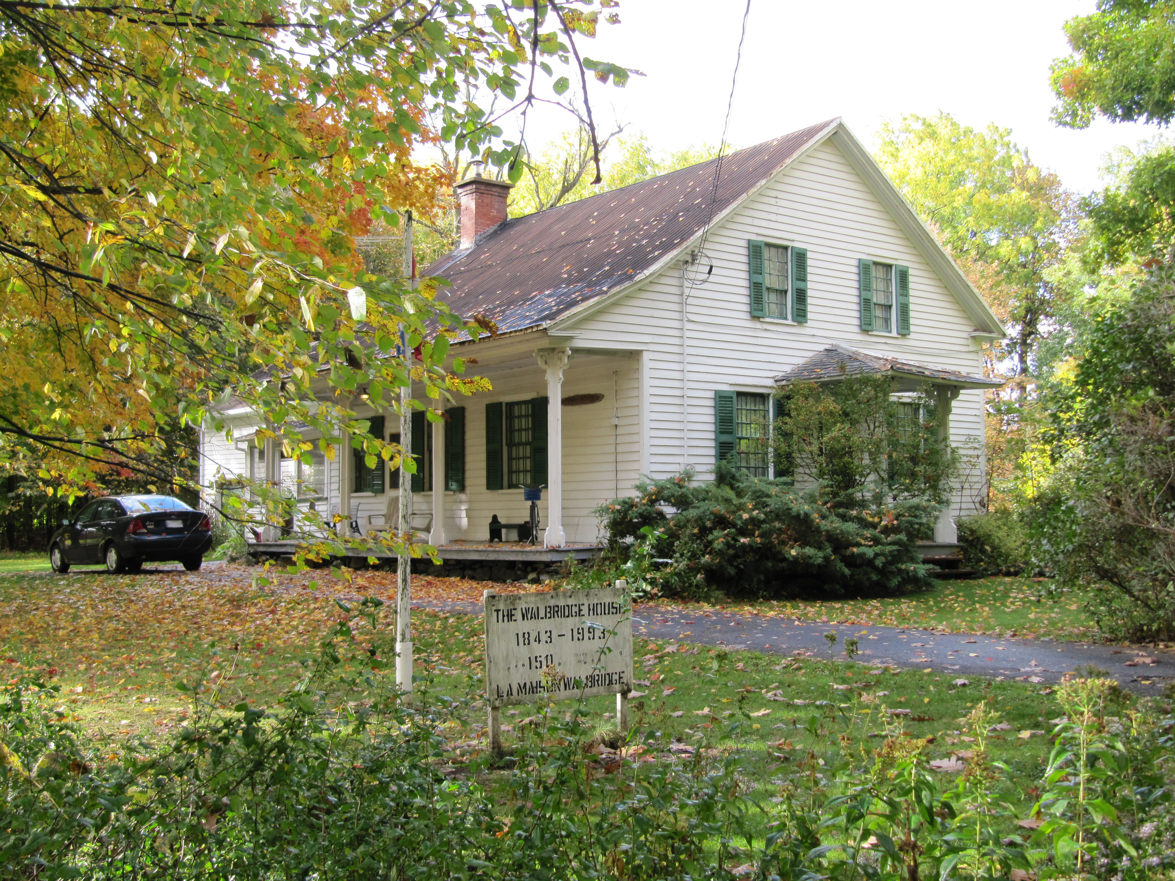 La maison Walbridge, située près de la grange Alexander-Solomon-Walbridge à Mystic (Saint-Ignace-de-Stanbridge, Québec)